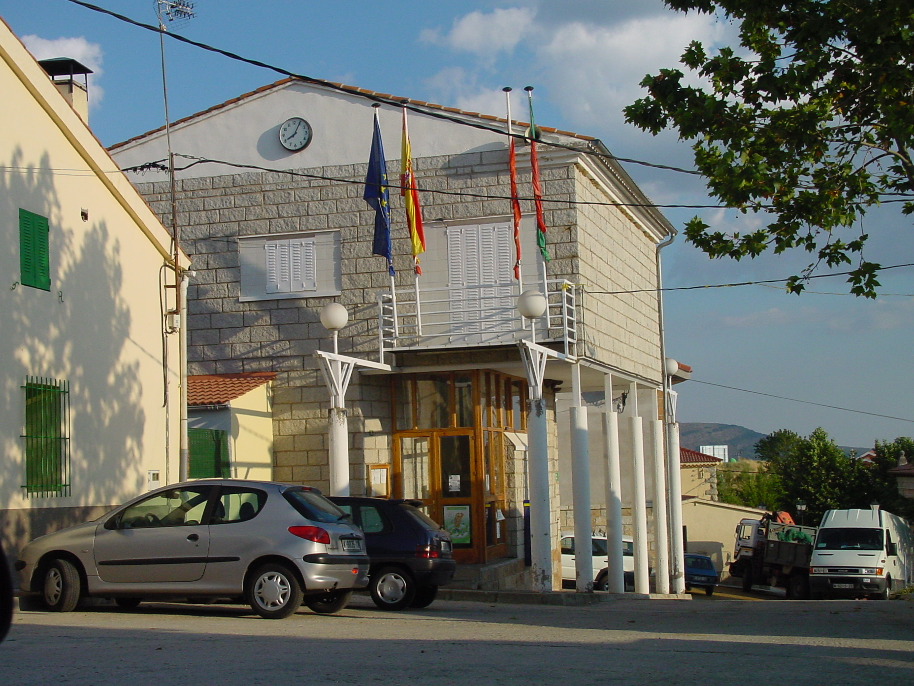 Ayuntamiento de Robledillo de la Jara.